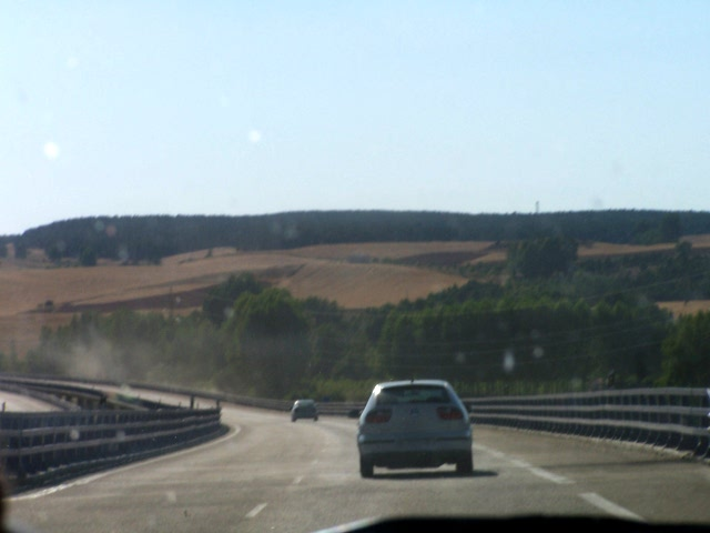 autovia A11 à Burgo de Osma